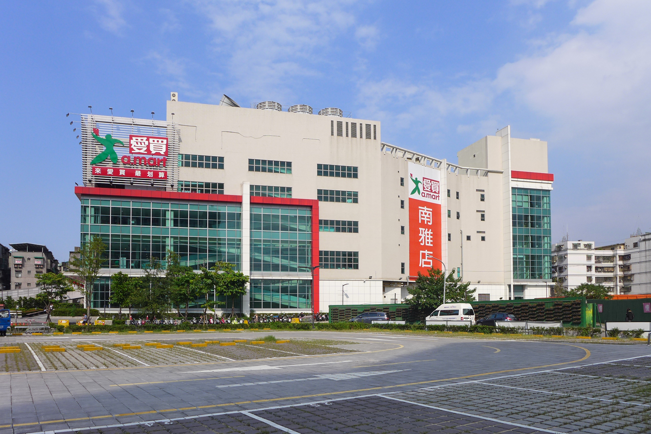 中文（台灣）: 愛買板橋南雅店